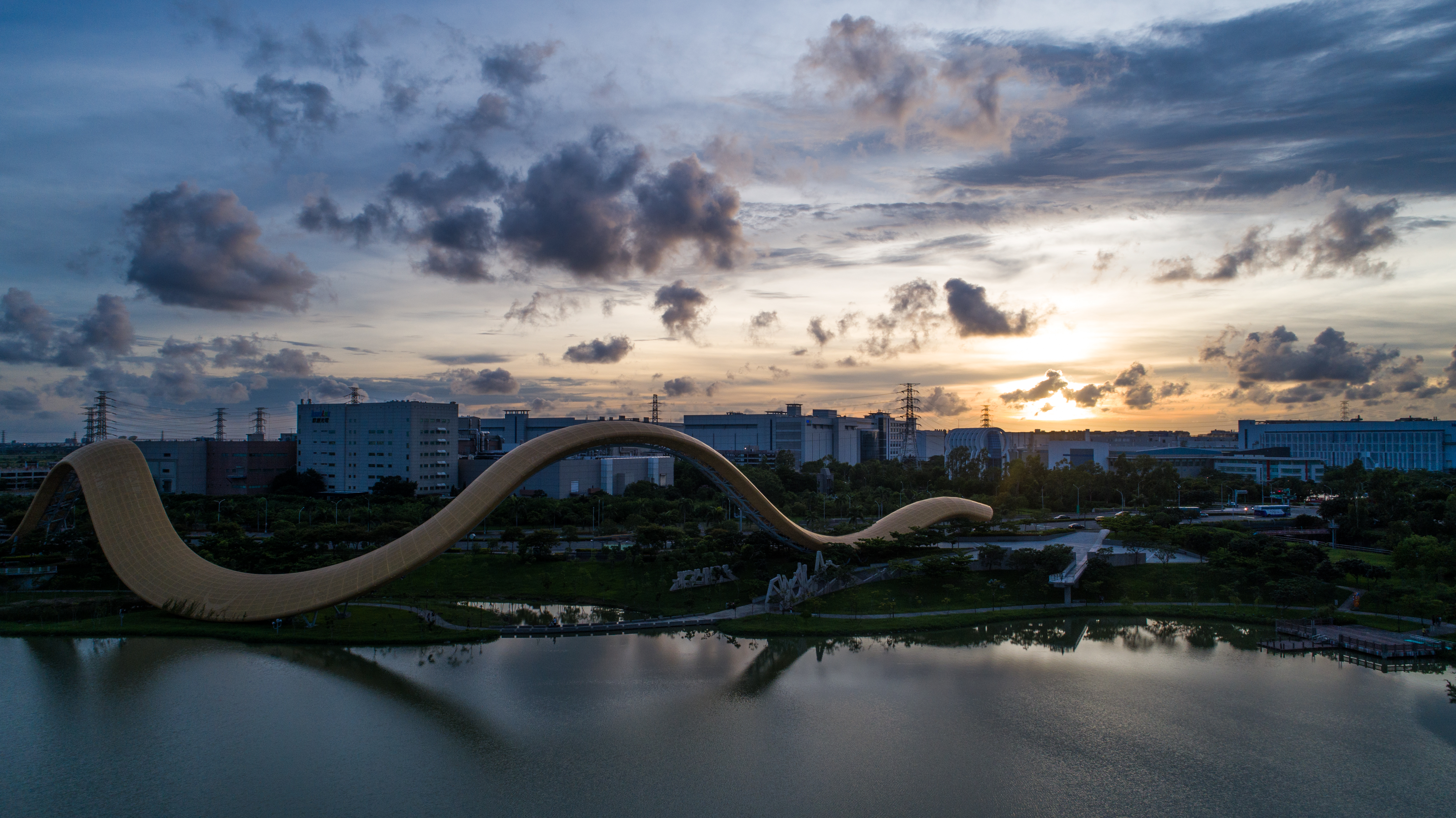 中文（台灣）: 南科迎曦湖